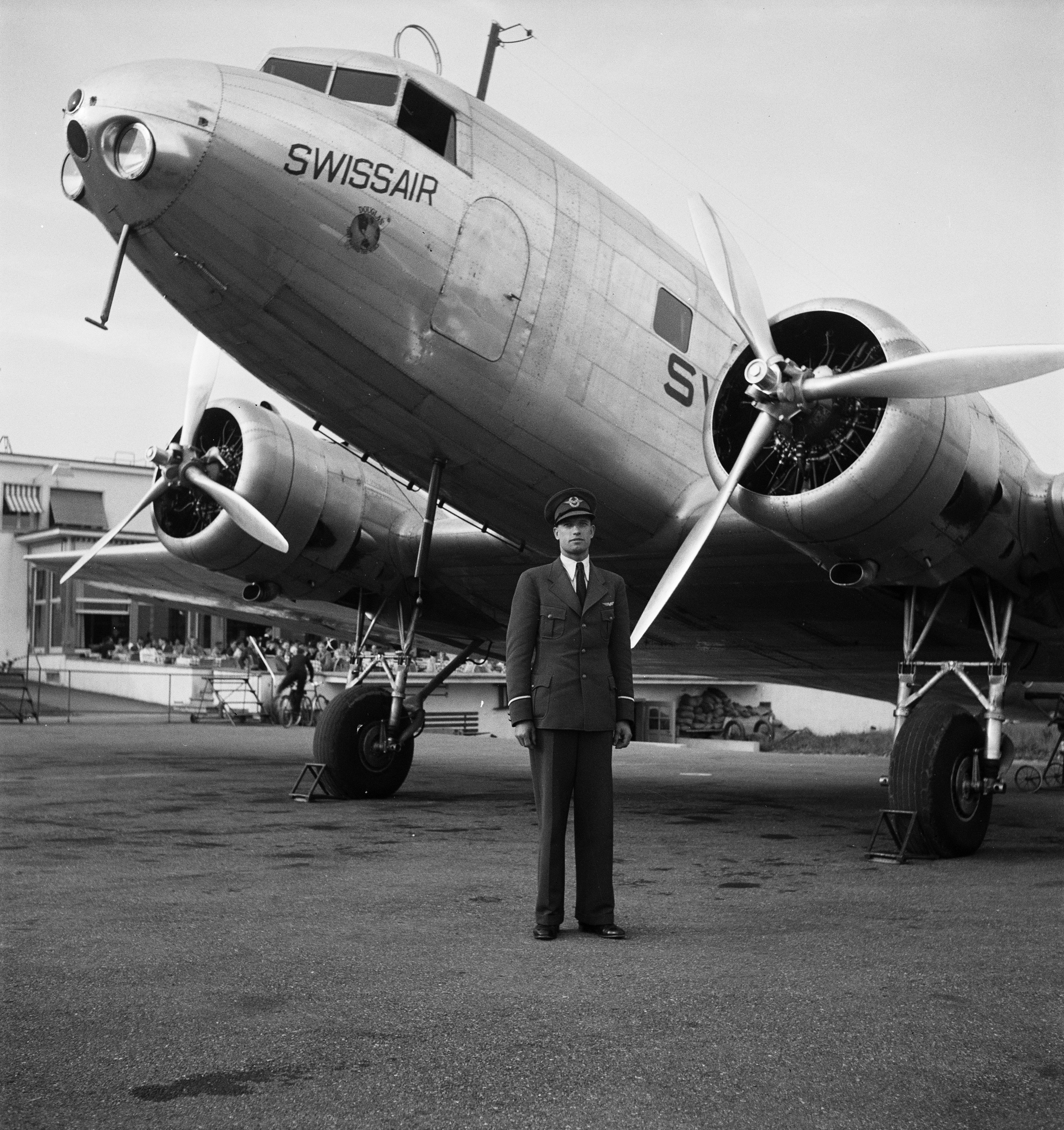 Swissair-Linienpilot Hans Ernst vor einer Douglas DC-2 in Dübendorf